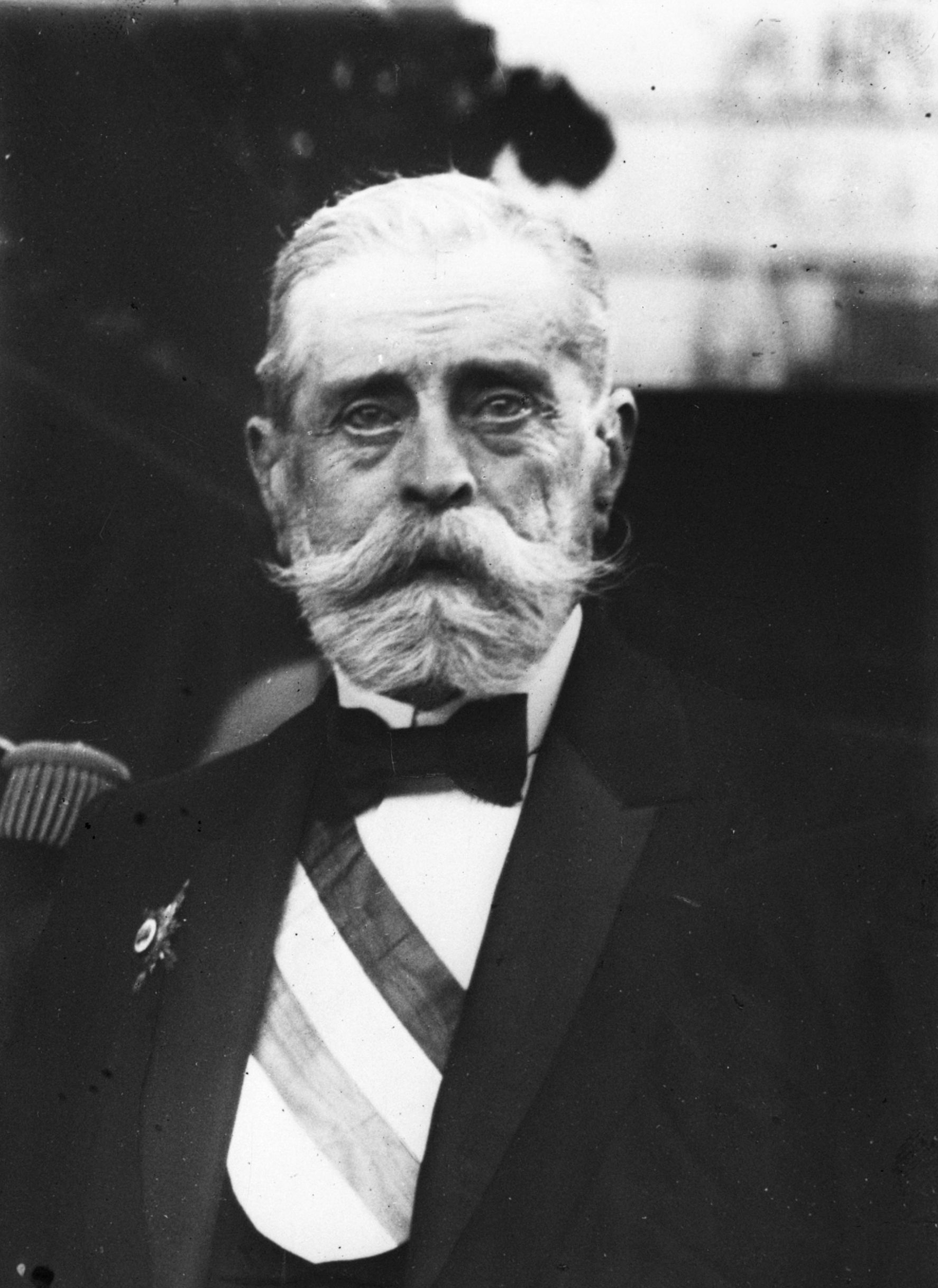 Camille Ournac, sénateur de la Haute-Garonne, en 1914